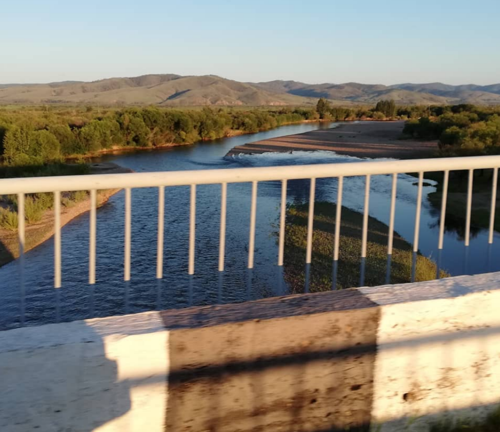 The Temnik River and the bridge over it in the Selenga district of Buryatia, Russia